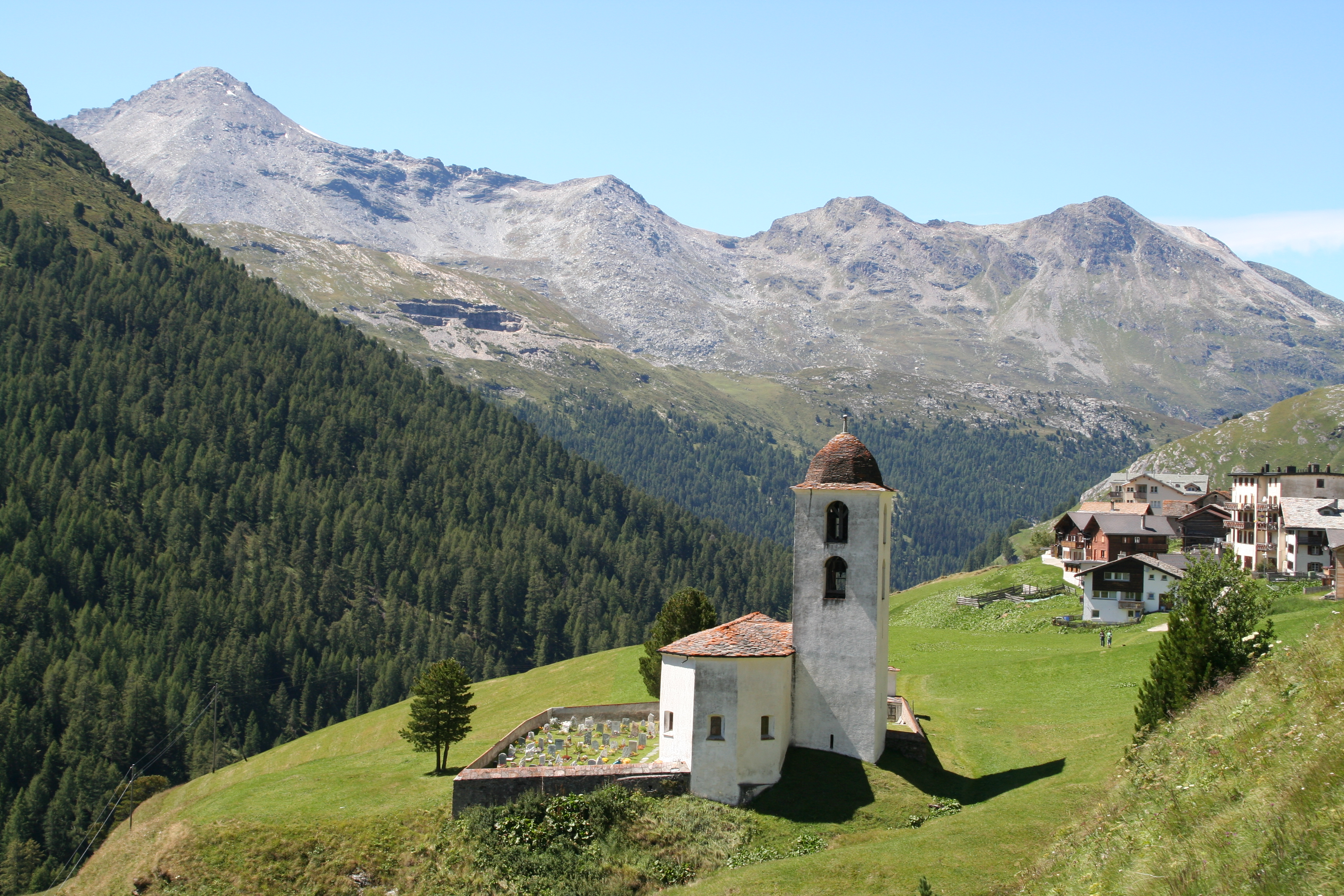 Ansicht von SO